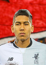 «Спартак» - «Ливерпуль»